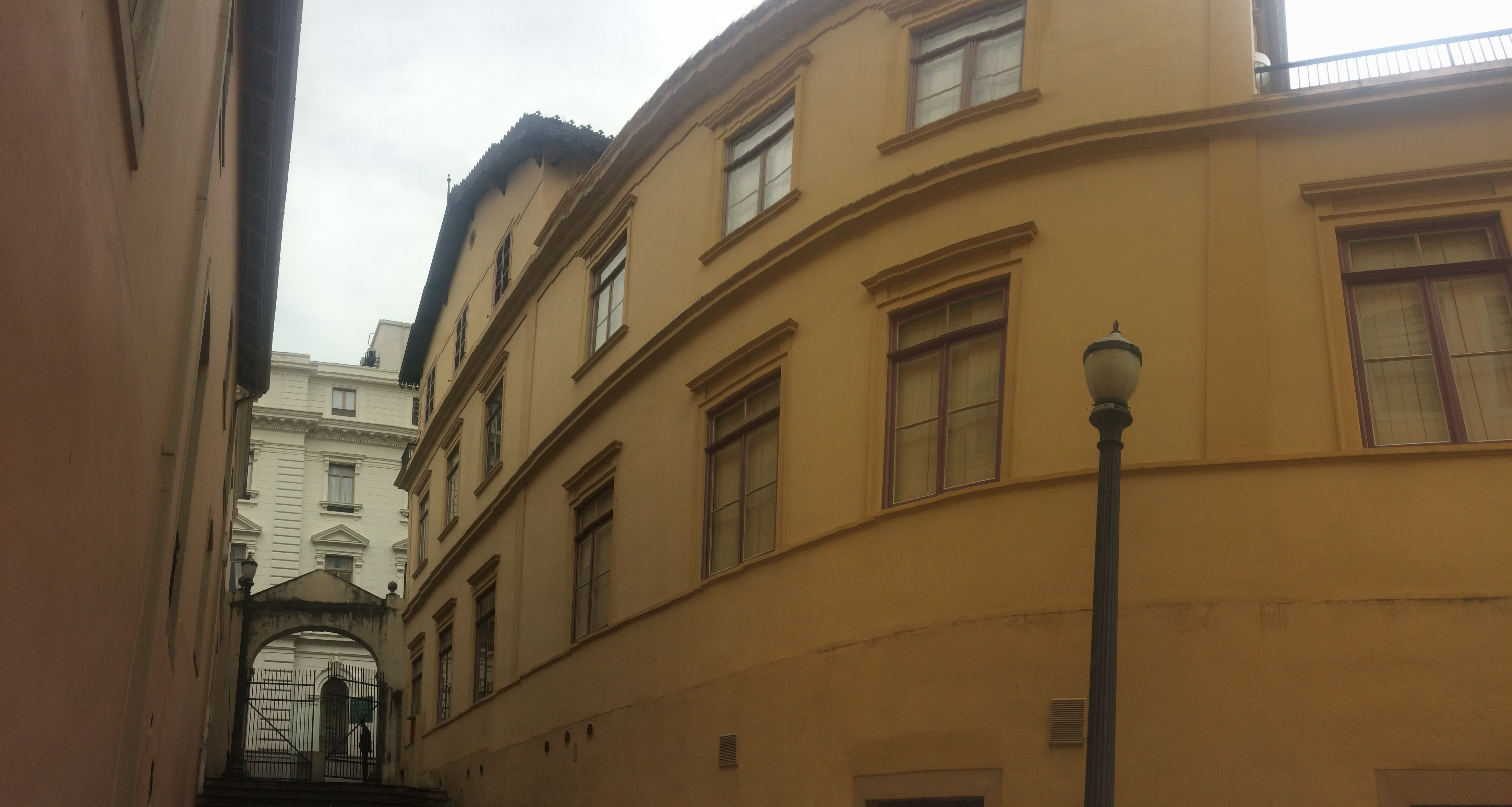 Visão lateral da Casa nº1, vista de dentro do Beco do Pinto